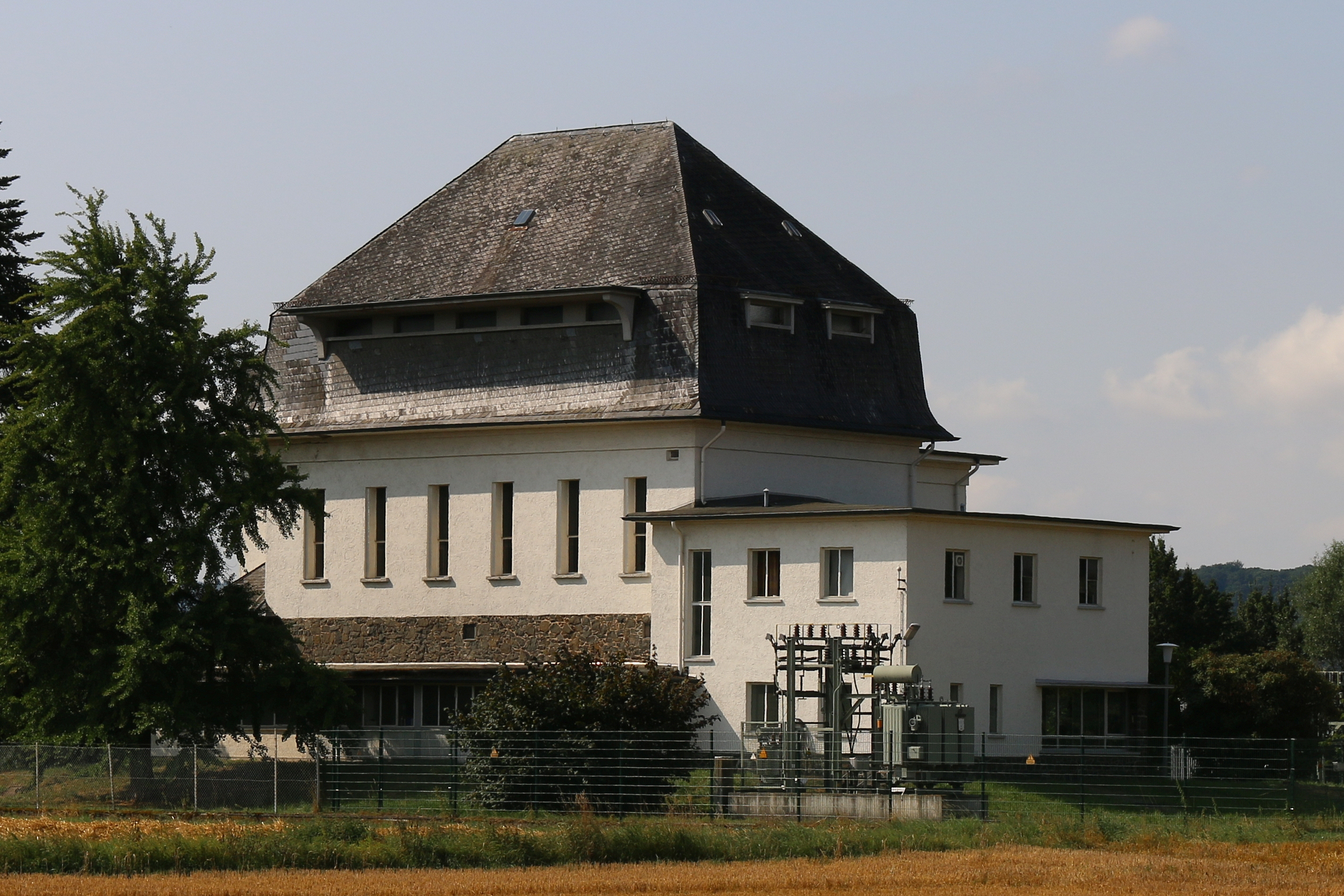 Staffel, Limburg an der Lahn: 110-kV-Umspannwerk Staffel der Mainkraftwerke (Süwag), Diezer Straße 44